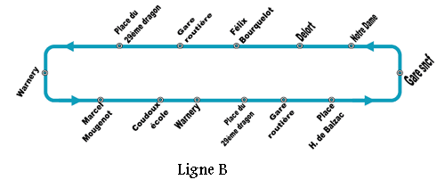 probus